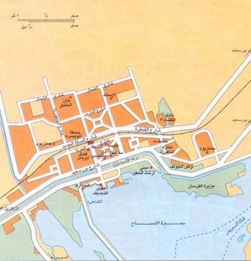 خريطة مدينة الإسماعيلية